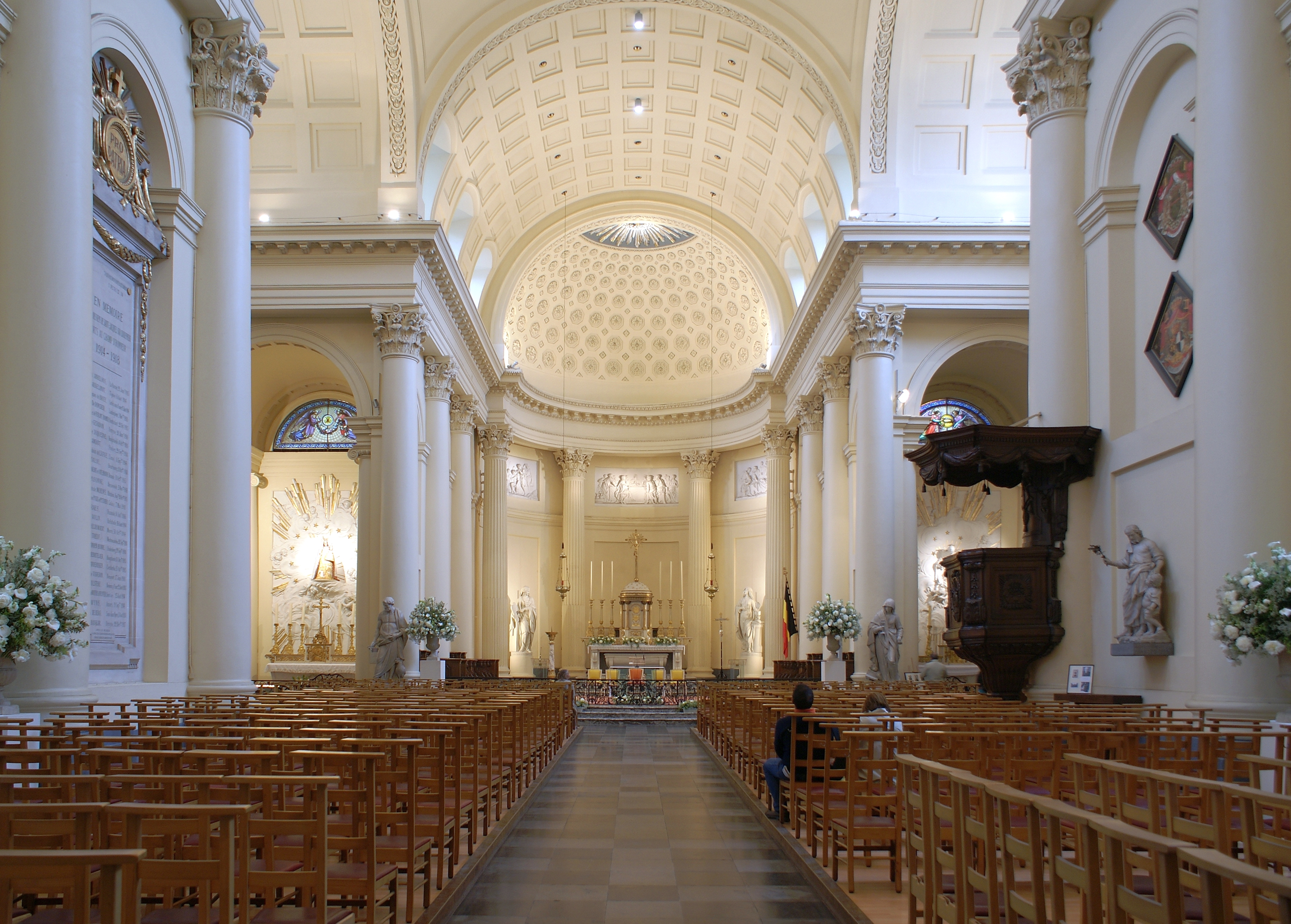 Sint-Jacobskerk-op-Koudenberg - Middenbeuk & Koor